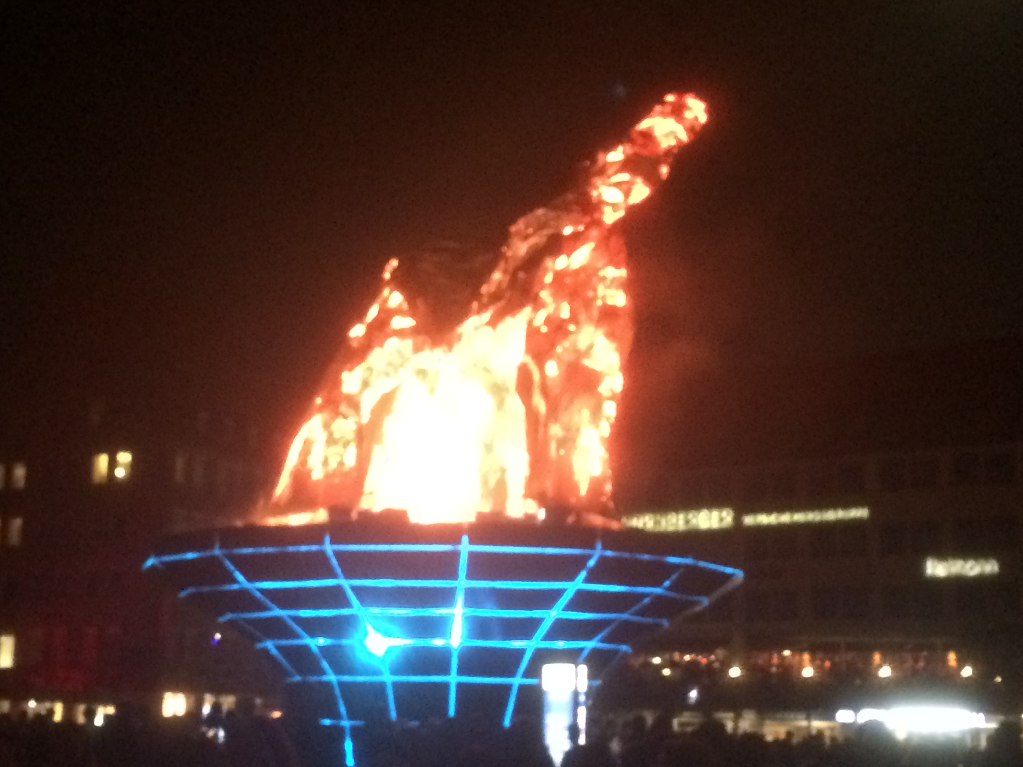 Fackel der Freiheit, Installation von Frieder Weiss; Blaue Nacht Nürnberg